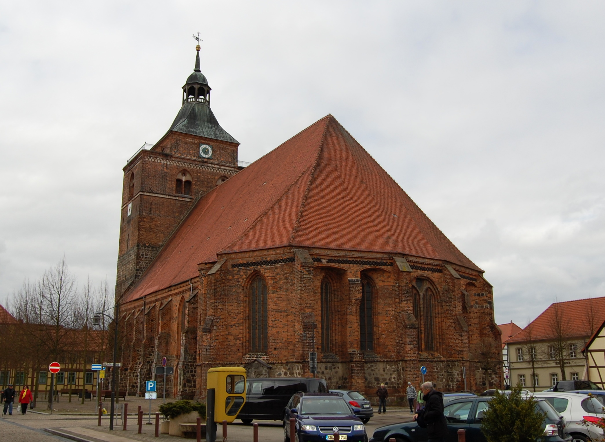 Sankt-Nicolai-Kirche in Osterburg